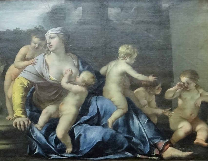 La Charité, huile sur toile, 1633, Jacques Blanchard (1600-1638)